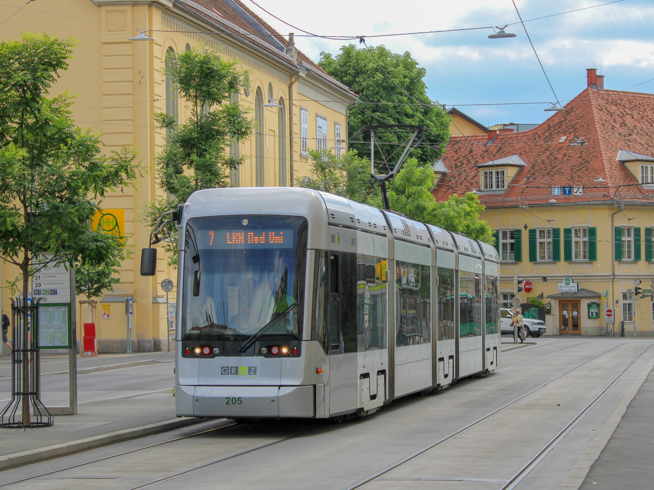 Variobahn am Kaiser-Josef-Platz.